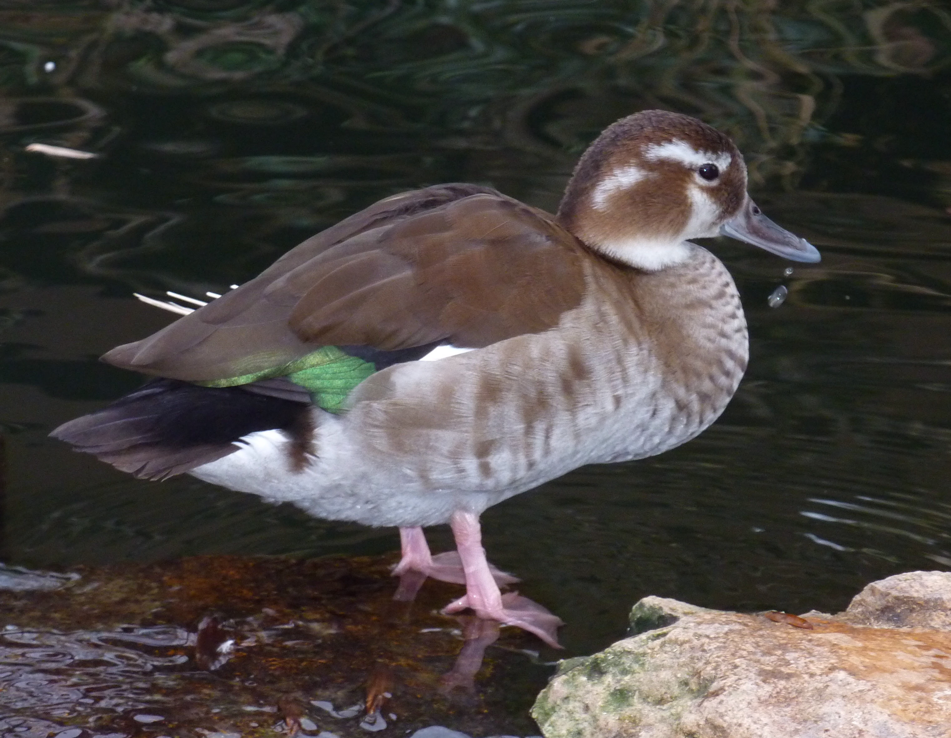 weibliche Rotschulterente im Heidelberger Zoo